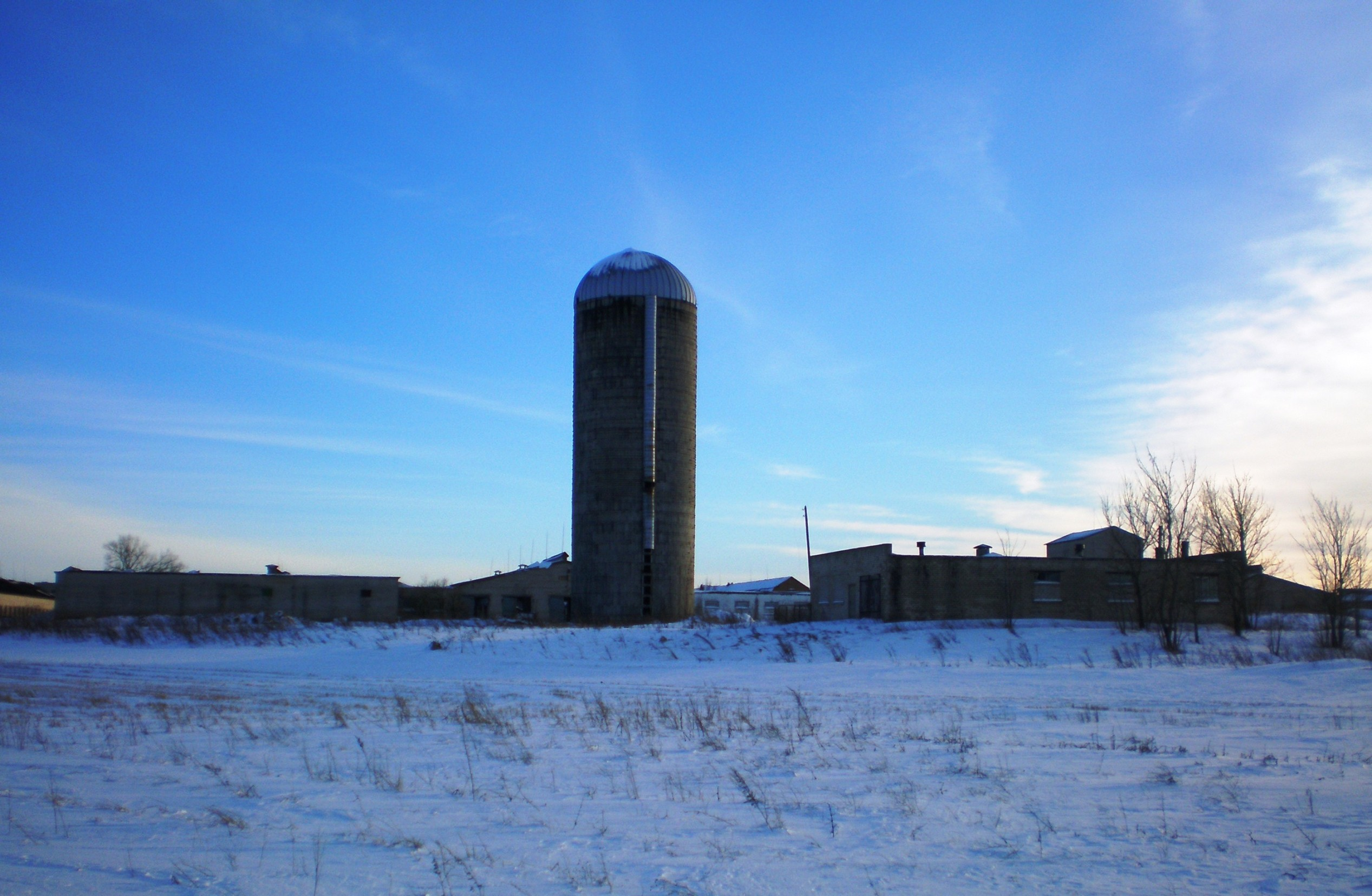 Keleriškių fermos siloso bokštas, Kėdainių raj.